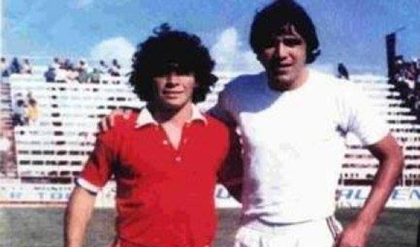 1978. Diego Maradona (Argentinos Jrs.) y Eduardo Bacas (Altos Hornos Zapla).